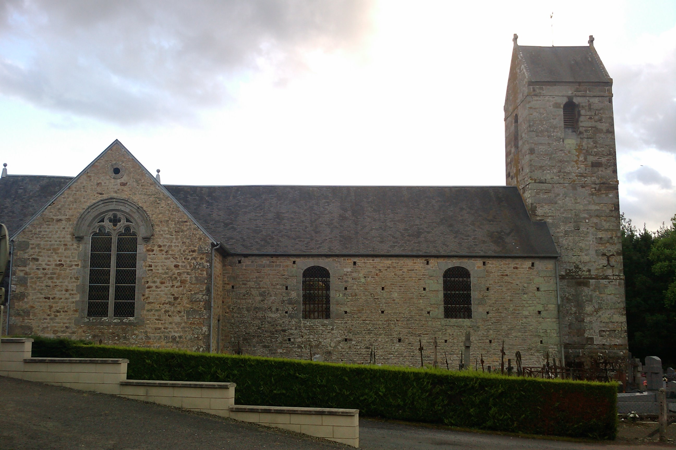 Église Saint-Martin de Plomb (Manche)